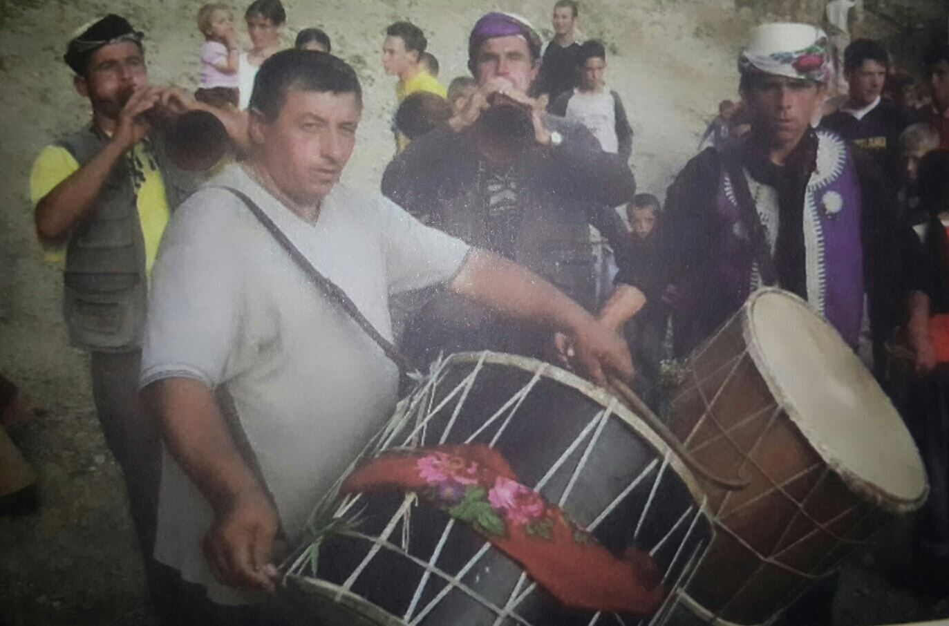 Ardhja e lodrave dhe pritja e tyre nga i zoti i shtëpisë